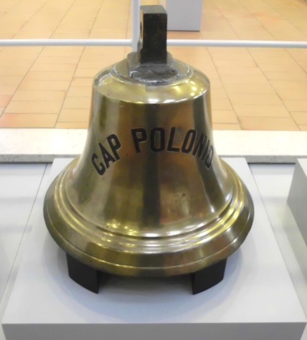 Schiffsgloccke der Cap Polonio